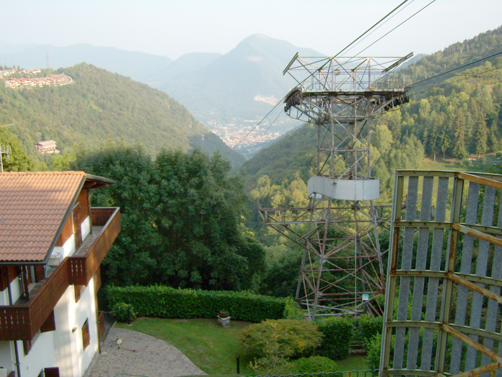 La funivia Albino-Selvino vista dalla stazione superiore (Selvino)